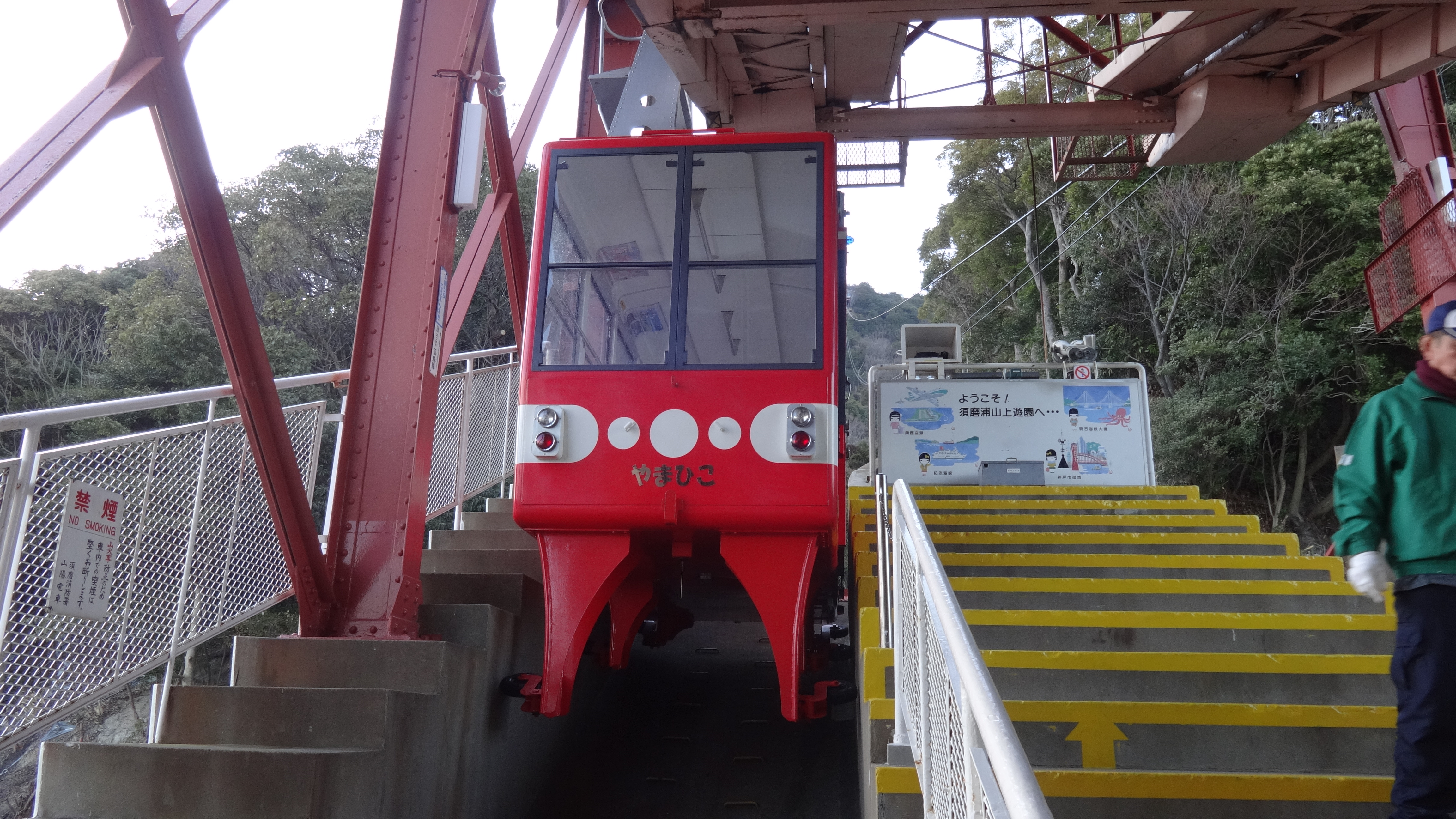 須磨浦ロープウェイ、山麓駅（須磨浦公園駅）構内にて撮影